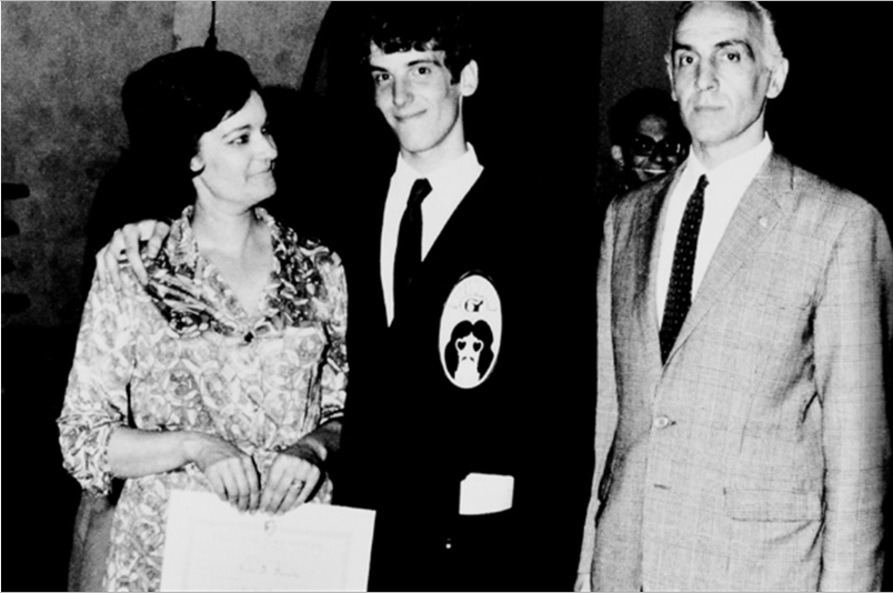 Luis Alberto Spinetta en 1968, con sus padres, Julia y Luis Santiago, al recibirse en el colegio San Román.